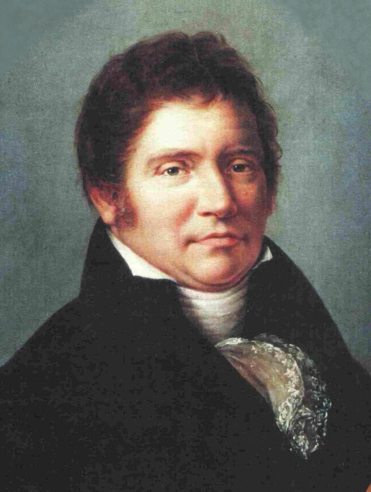 Pietro Cavagnari (1769-1849), politico parmigiano.